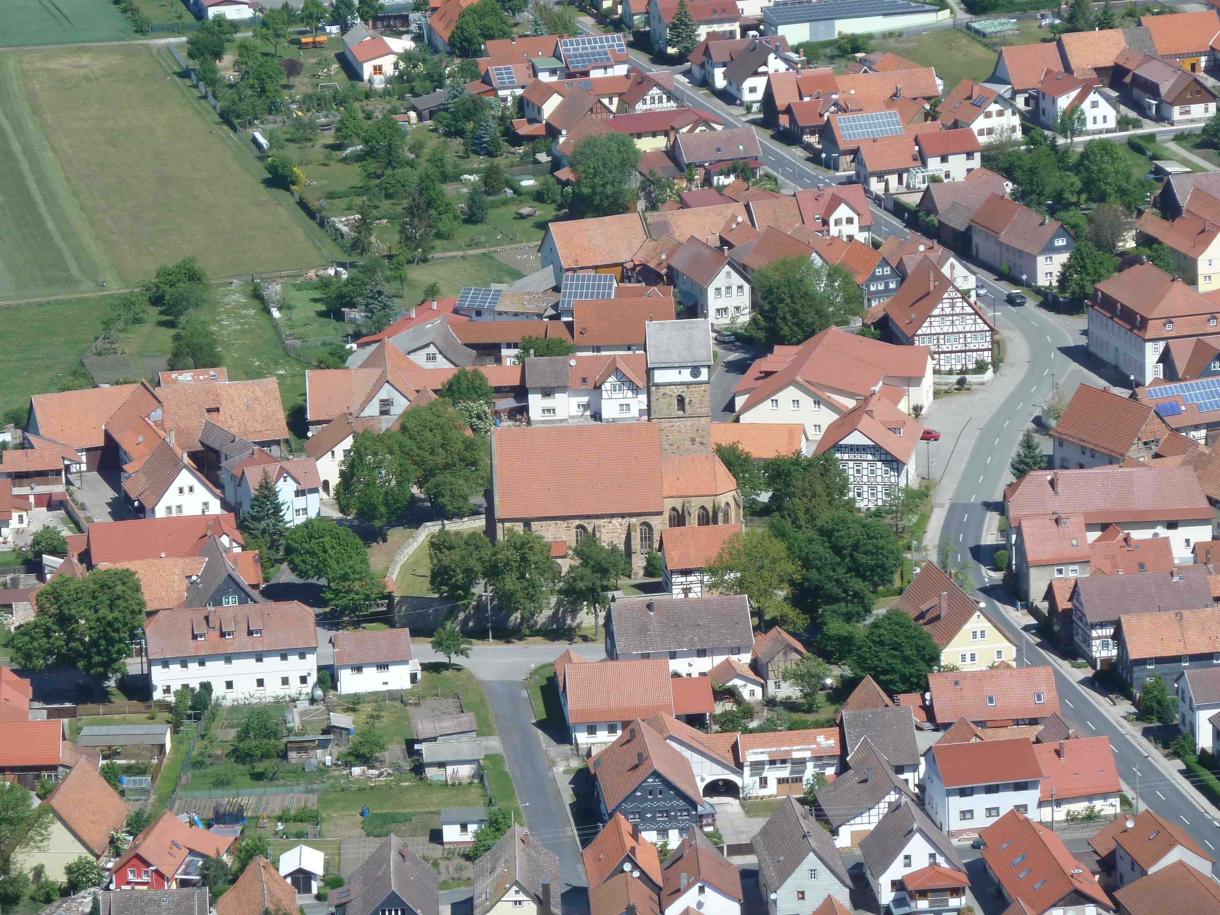 Luftbild von Milz (Thüringen) mit Magdalenenkirche